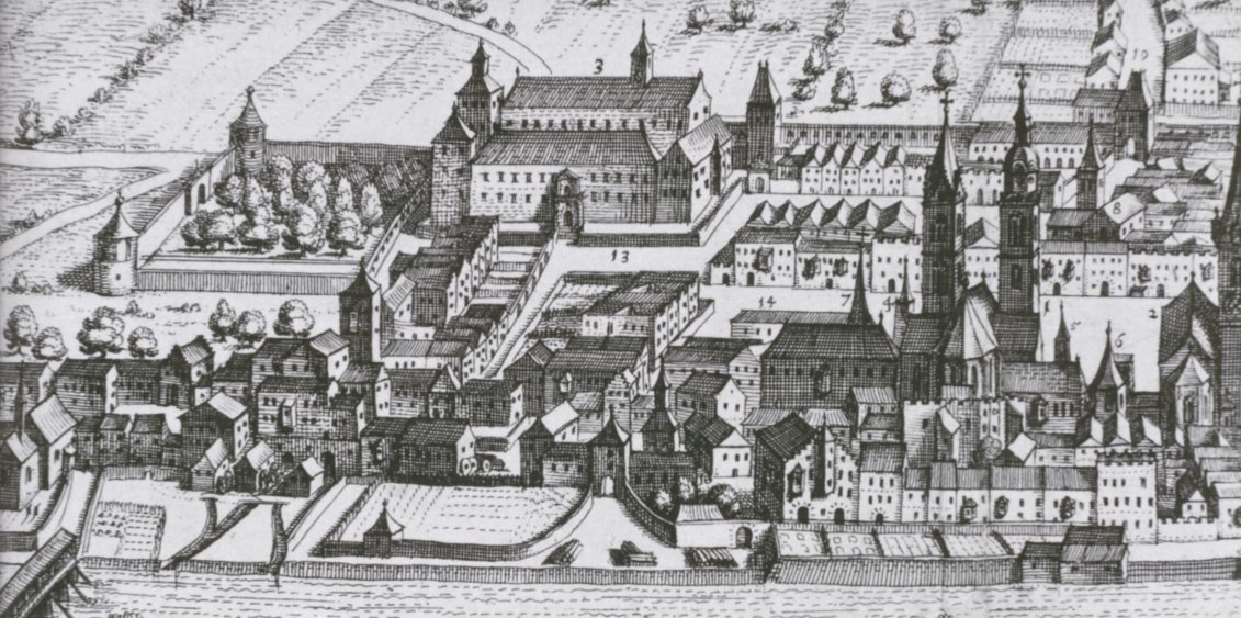 Brixen mit Hofburg (oben Mitte links) und Dom (unten rechts), Kupferstich von Matthäus Merian, 1649